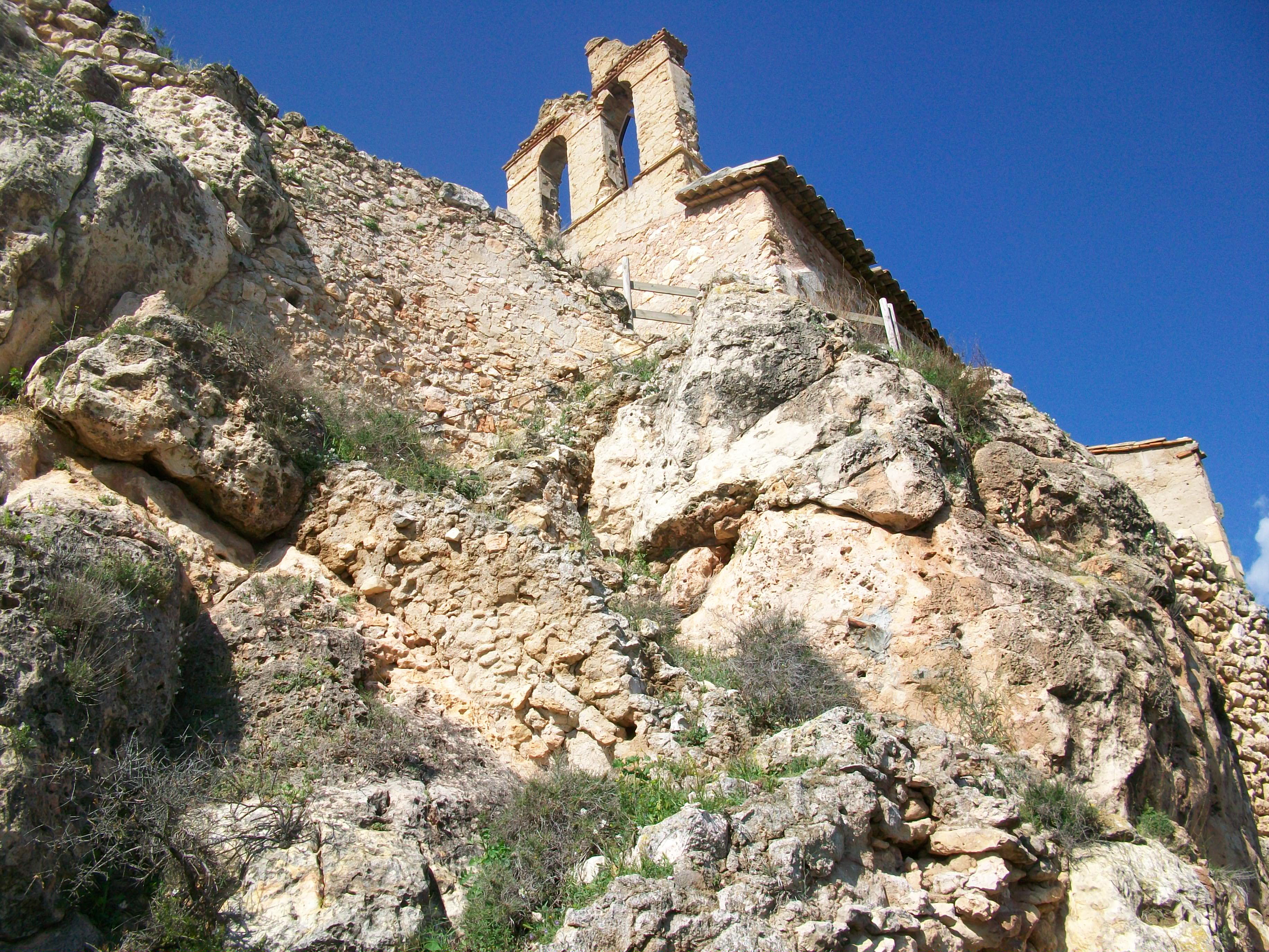 Es poden apreciar l'escalinata per pujar-hi